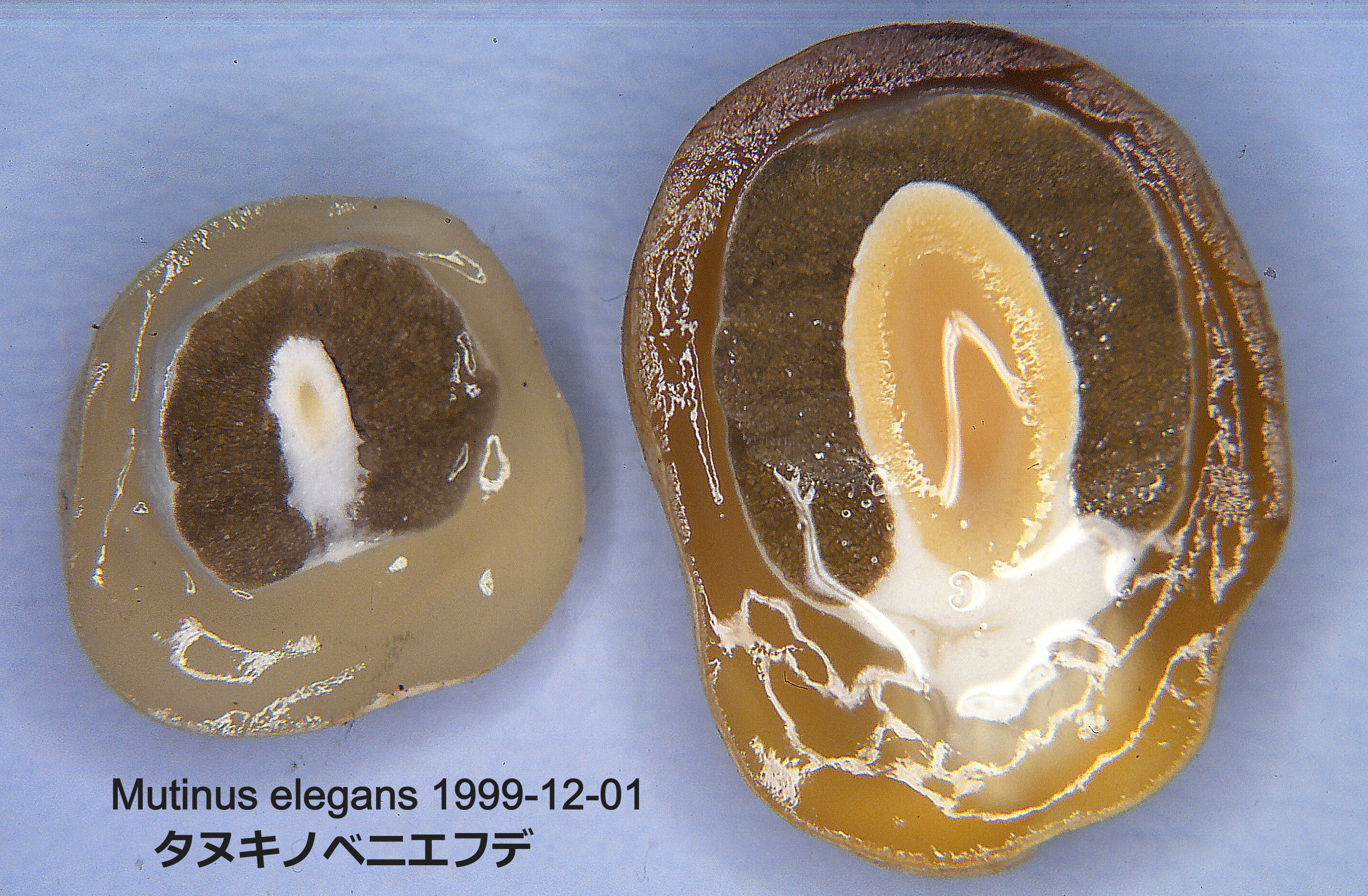 日本新産タヌキノベニエフデ Mutinus elegans の幼菌(長卵形)